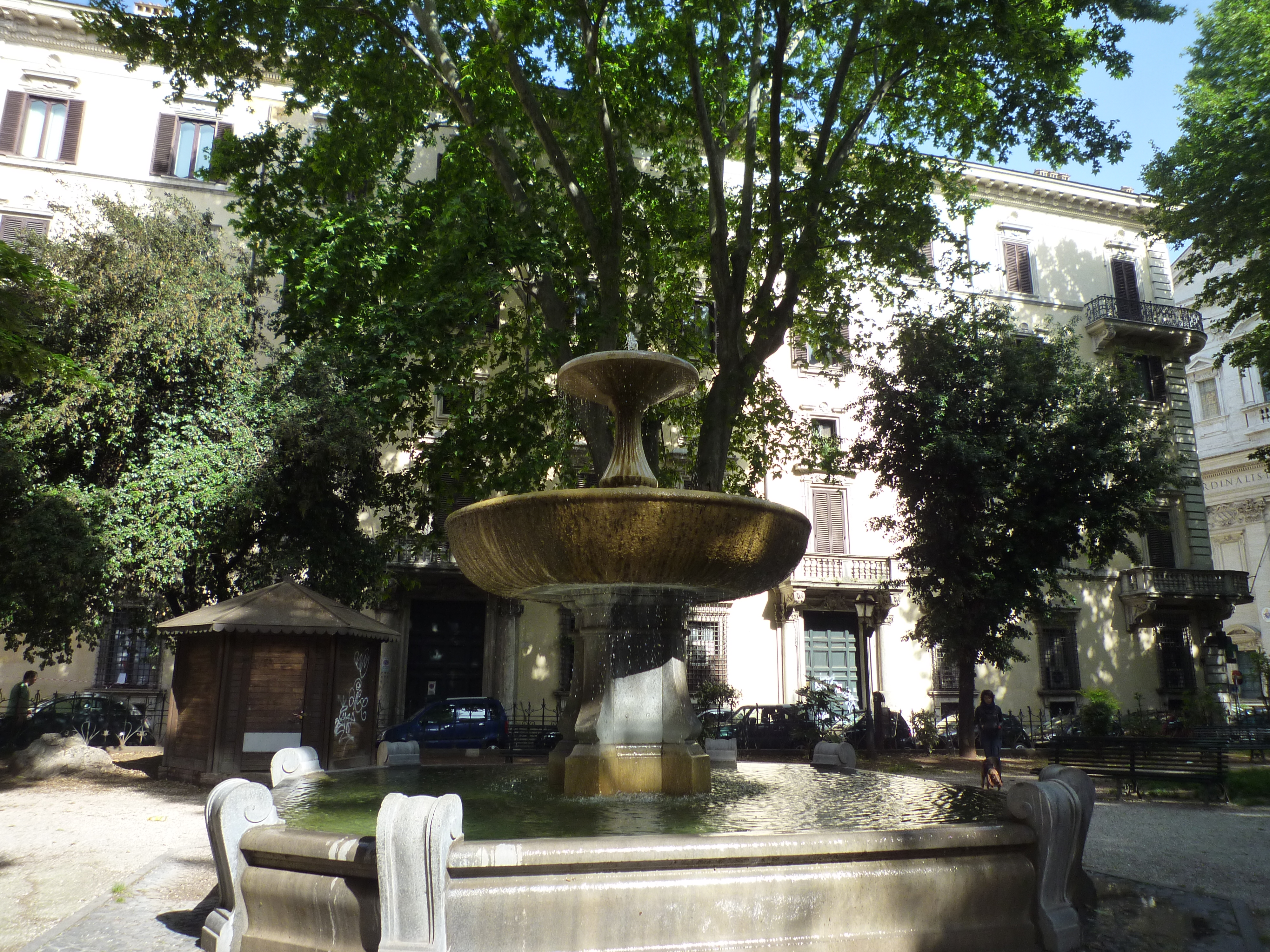 Fontana di Piazza Benedetto Cairoli